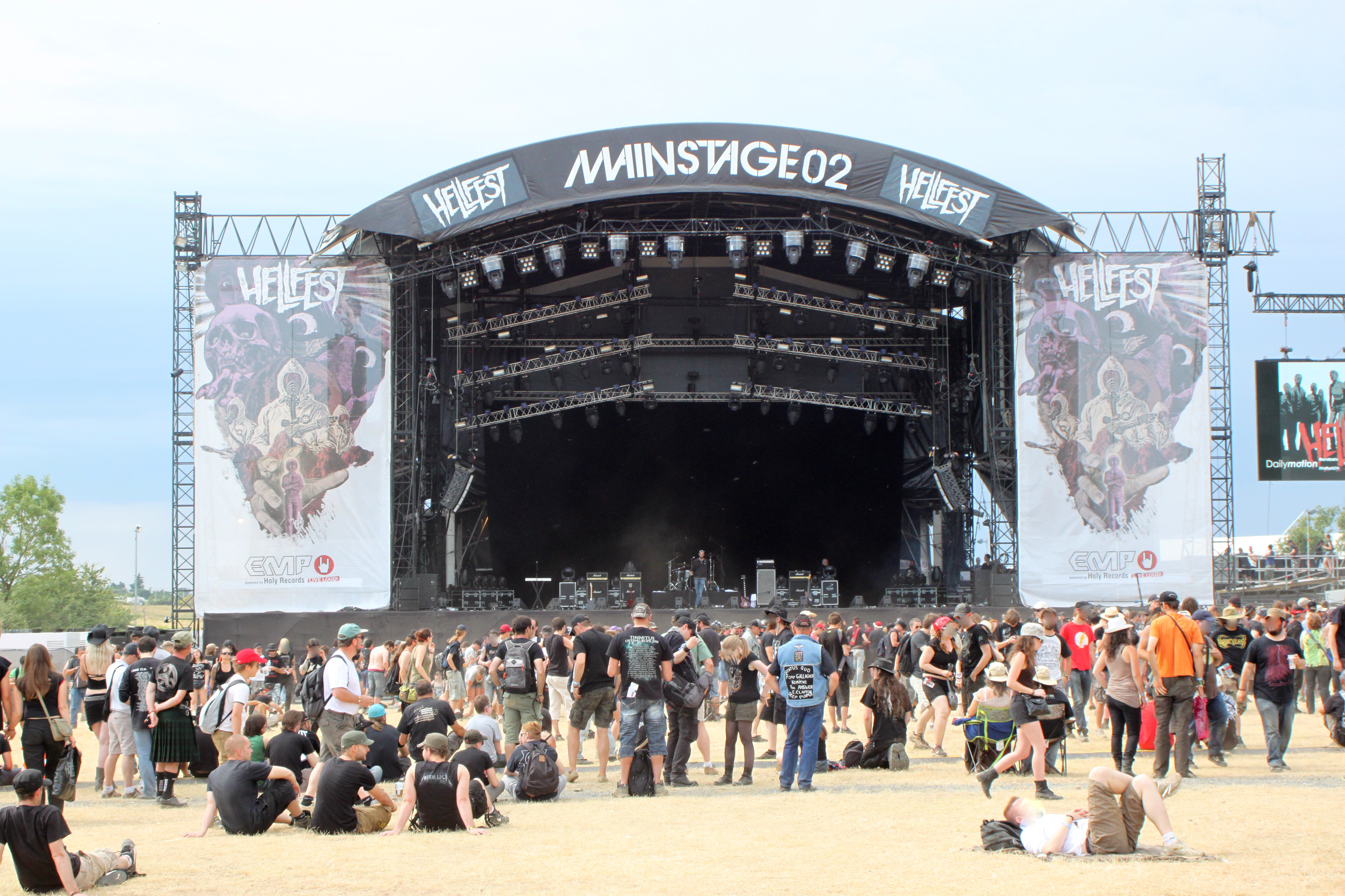 Hellfest 2014. Mainstage 02. Fr-44-Clisson.